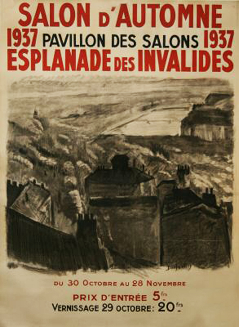 Fusain de Georges Dufrénoy.